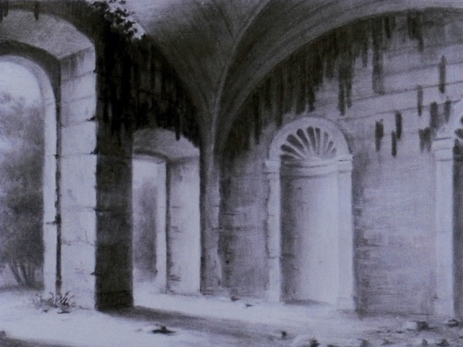 Muschelgrotte vor dem Umbau, heute Mausoleum am Büchenberg